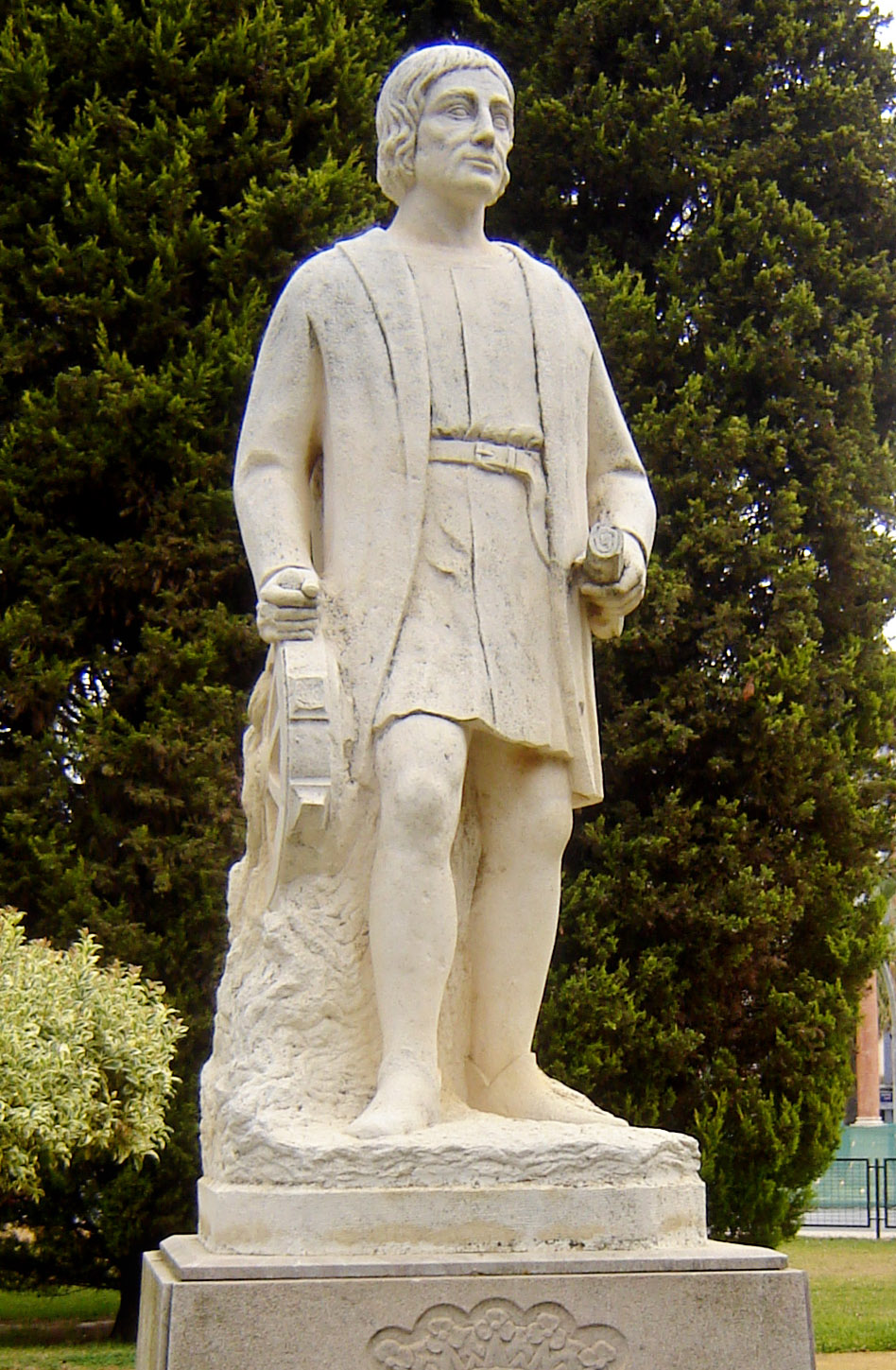 Estatua de Alonso Sánchez de Huelva, supuesto predescubridor de nuevo mundo.